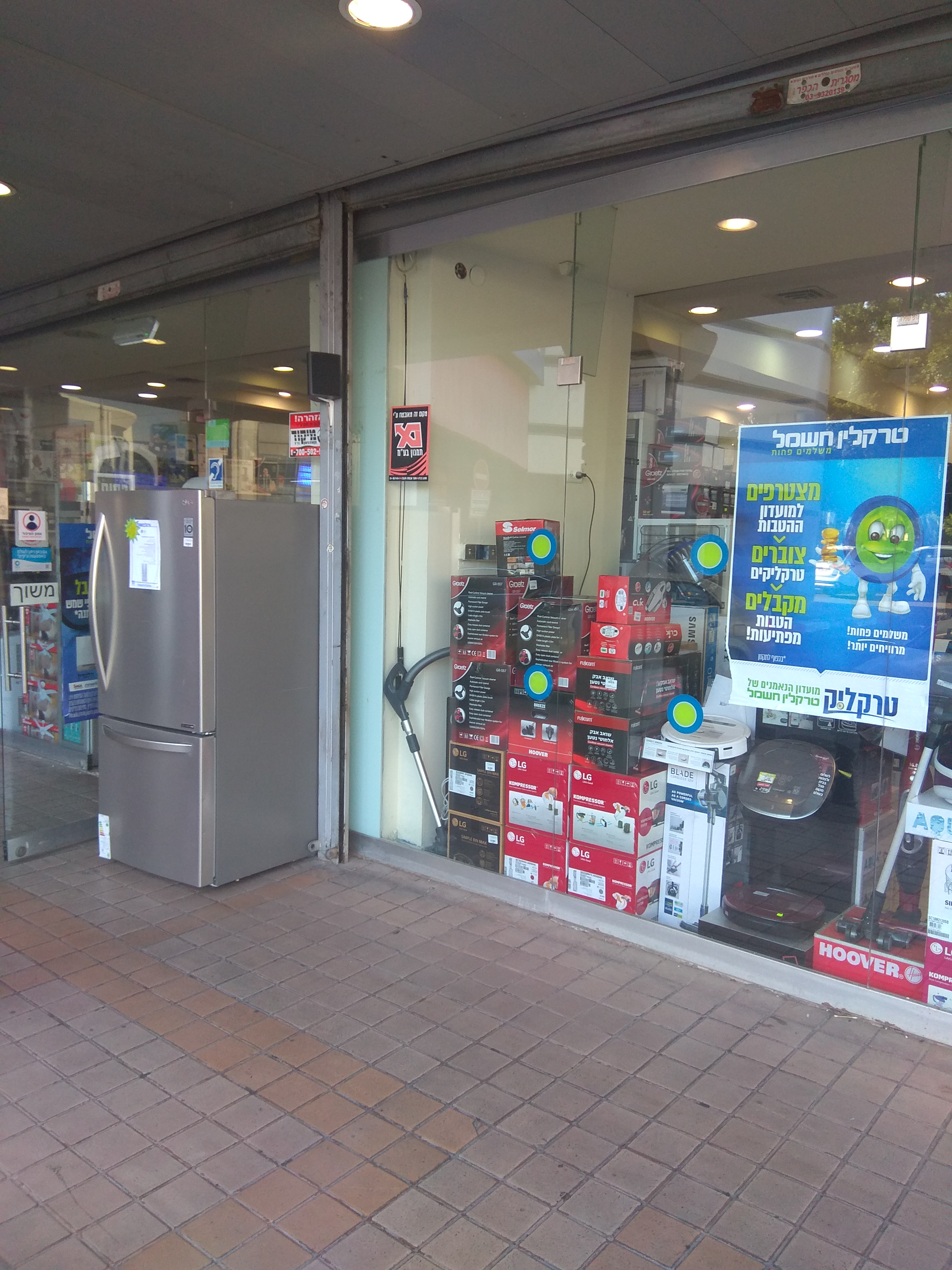 טרקלין חשמל, סניף הקריון בקריית ביאליק, 2018